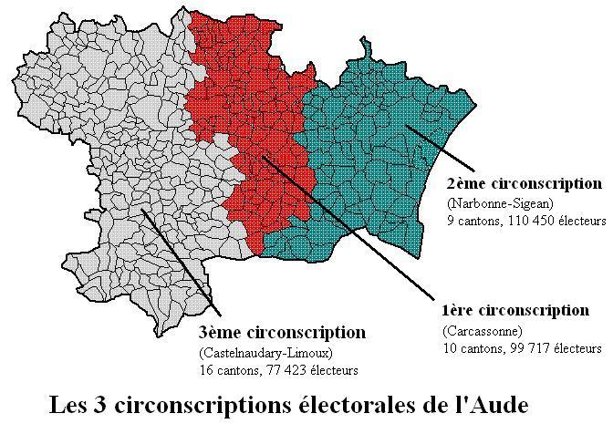 Les 3 circonscriptions électorales de l’Aude, et leurs cantons.